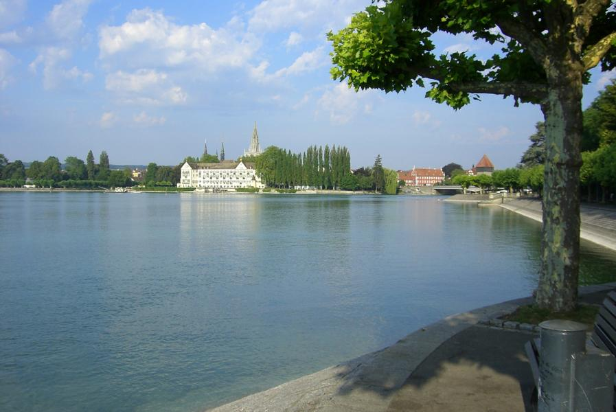 Konstanz, Seestraße am Morgen